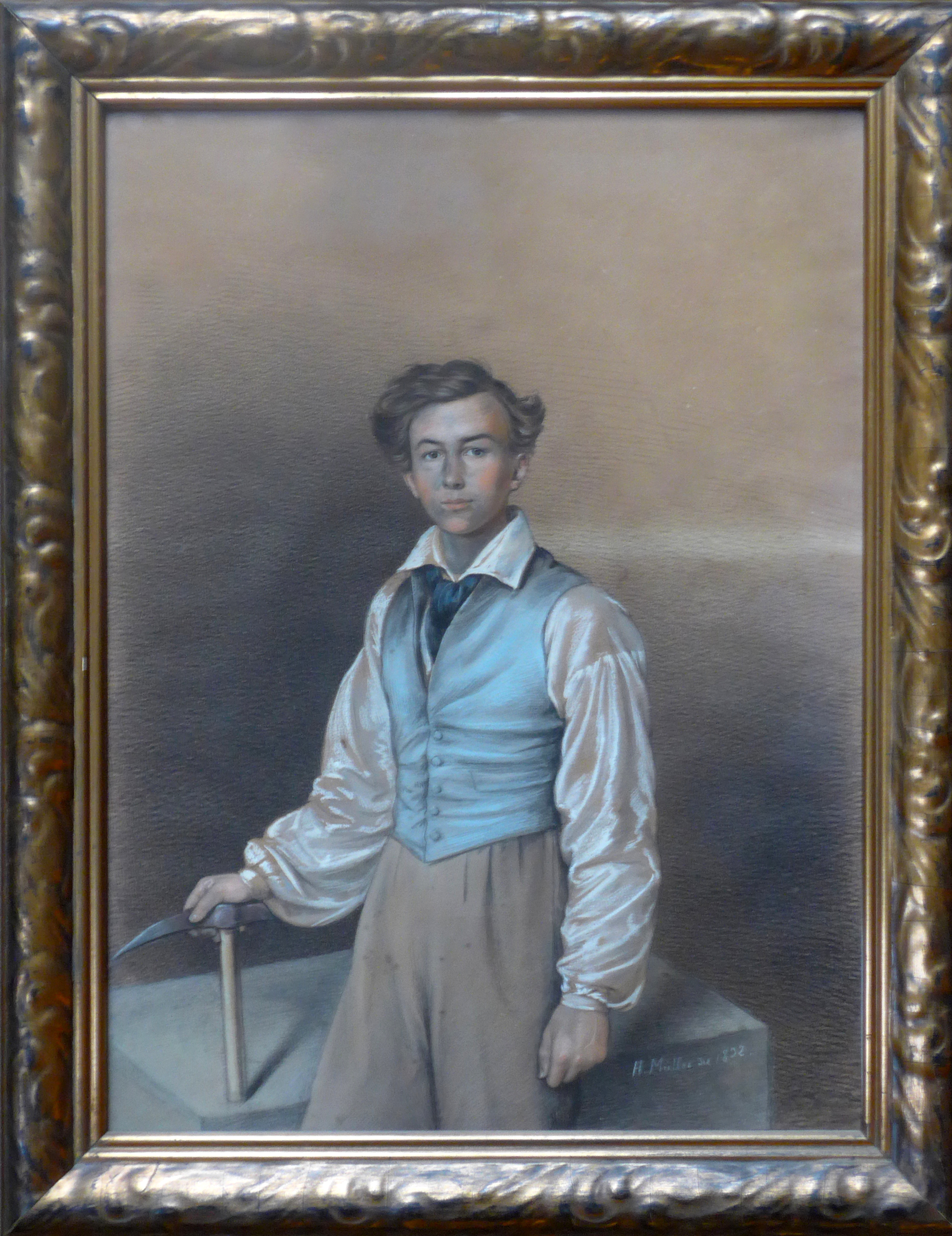 Alexander Sältzer, etwa 19-jährig als Zimmerer-Geselle. Pastell 1832. Alexander übersiedelte von Eisenach in die USA, wo er sich als Architekt einen Namen machte.